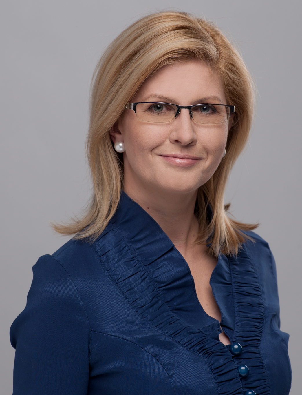 Zdjęcie Posła na Sem RP Iwony Arent